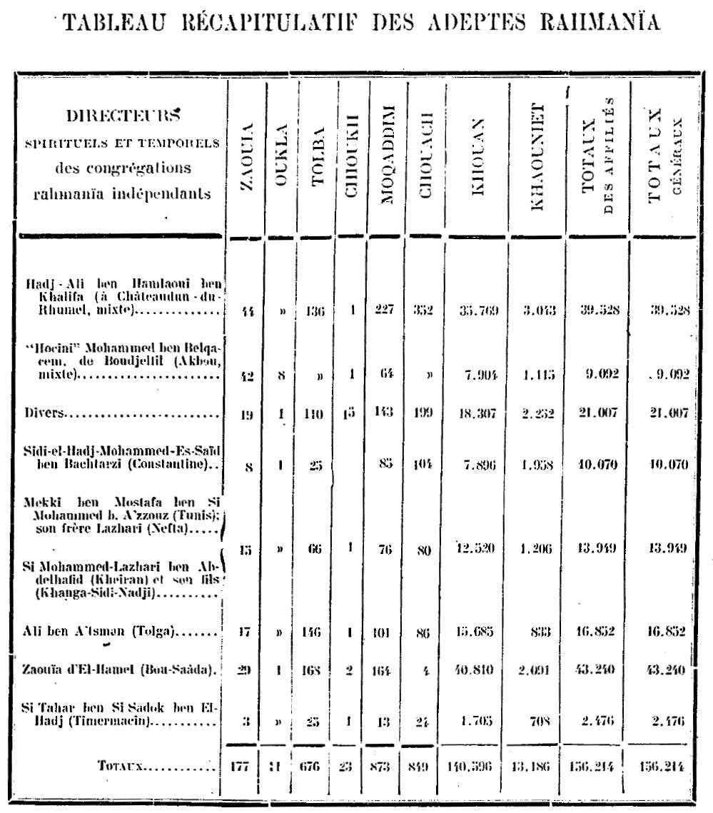 Number of Rahmaniya members in 1897